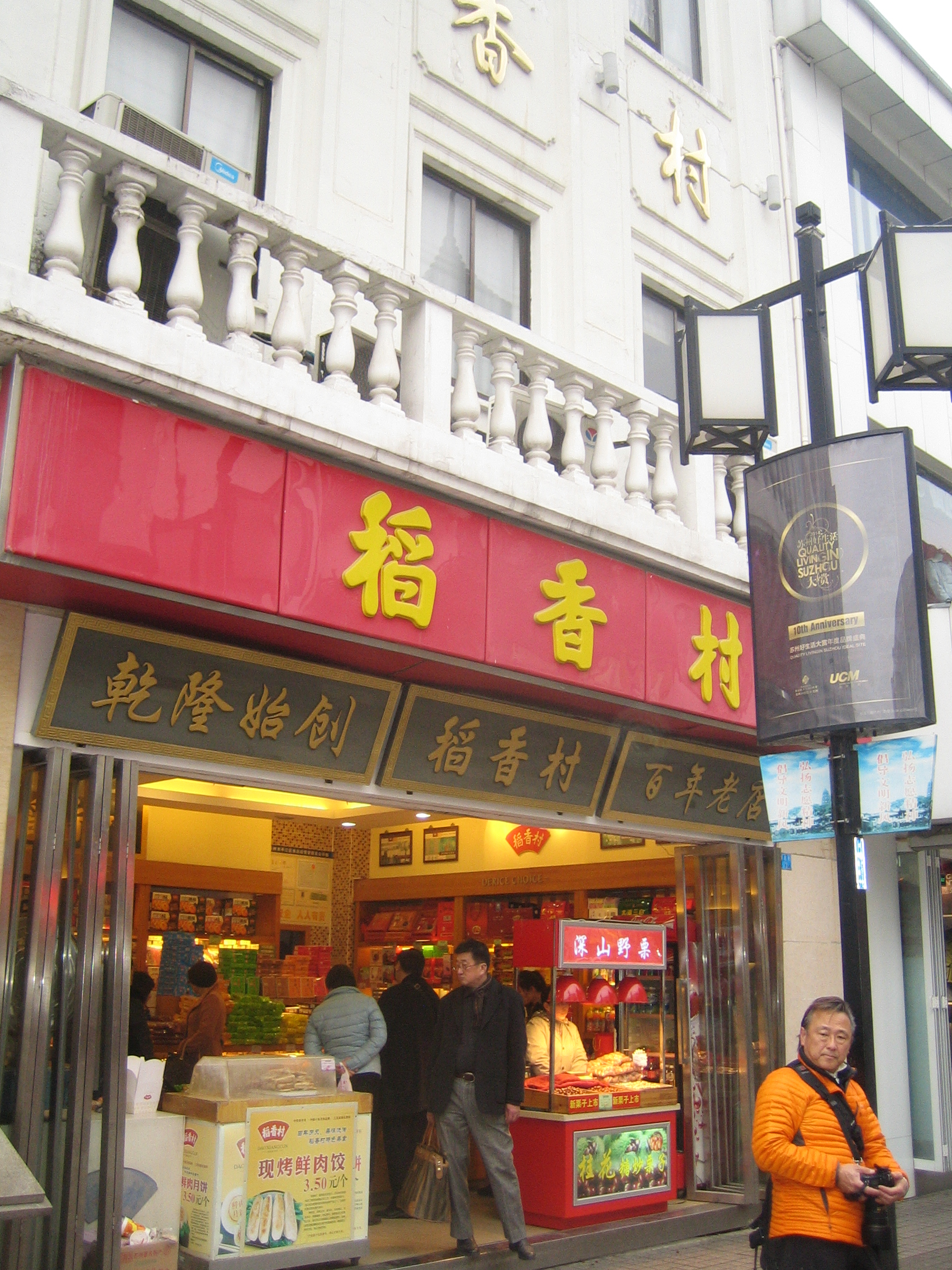 中华老字号——苏州稻香村（2015年）